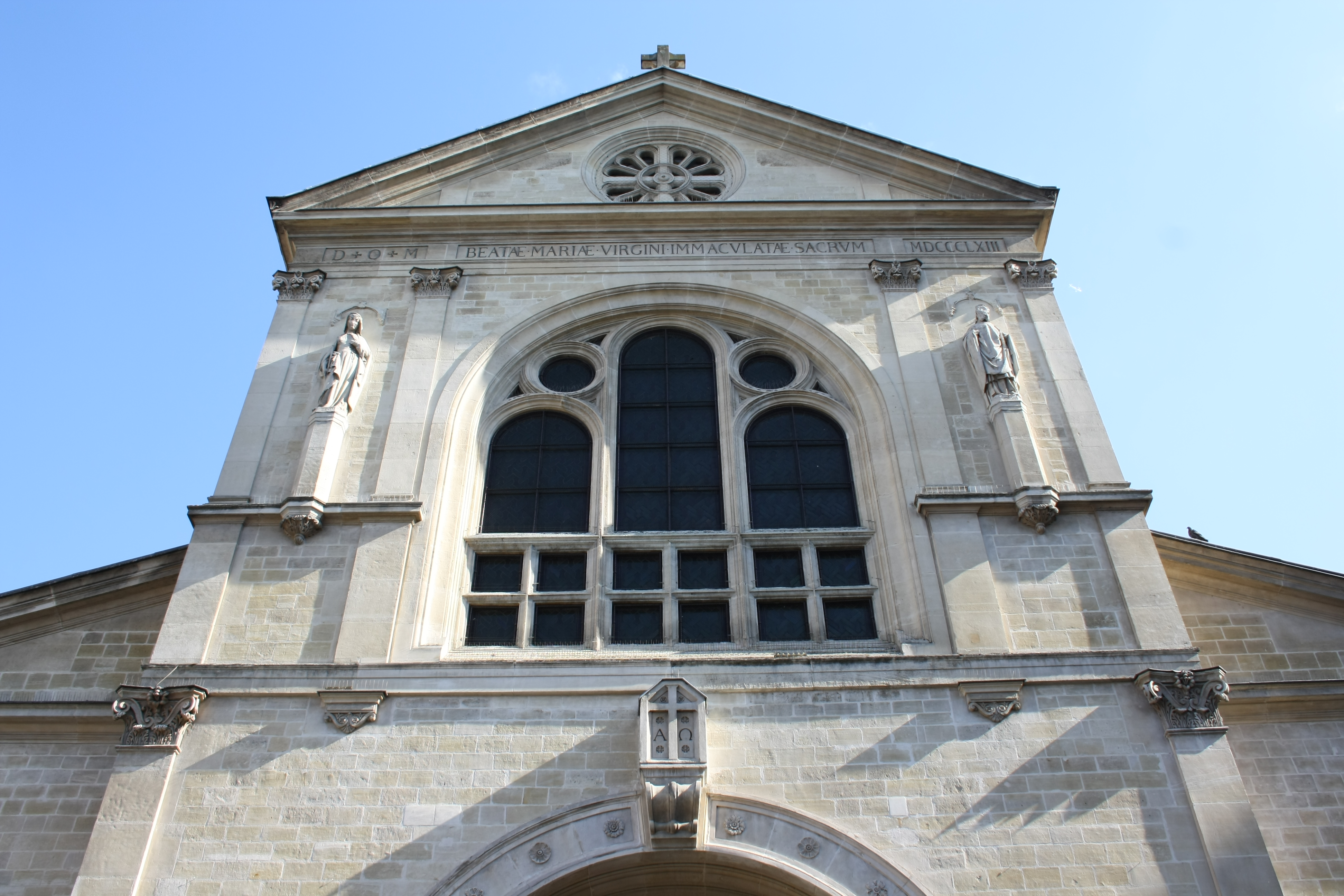 Kirche Notre-Dame de Clignancourt im 18. arrondissement von Paris, Hauptfassade